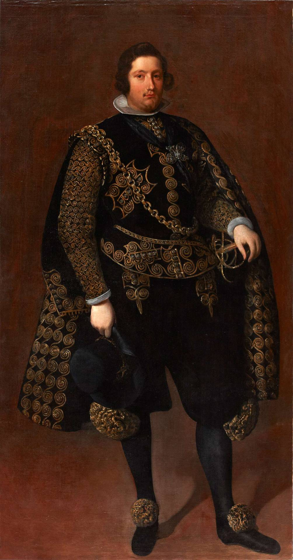 Círculo de Diego Veláquez - Luis de Guzmán Ponce de León, Gobernador y Capitán General del Estado de Milán.